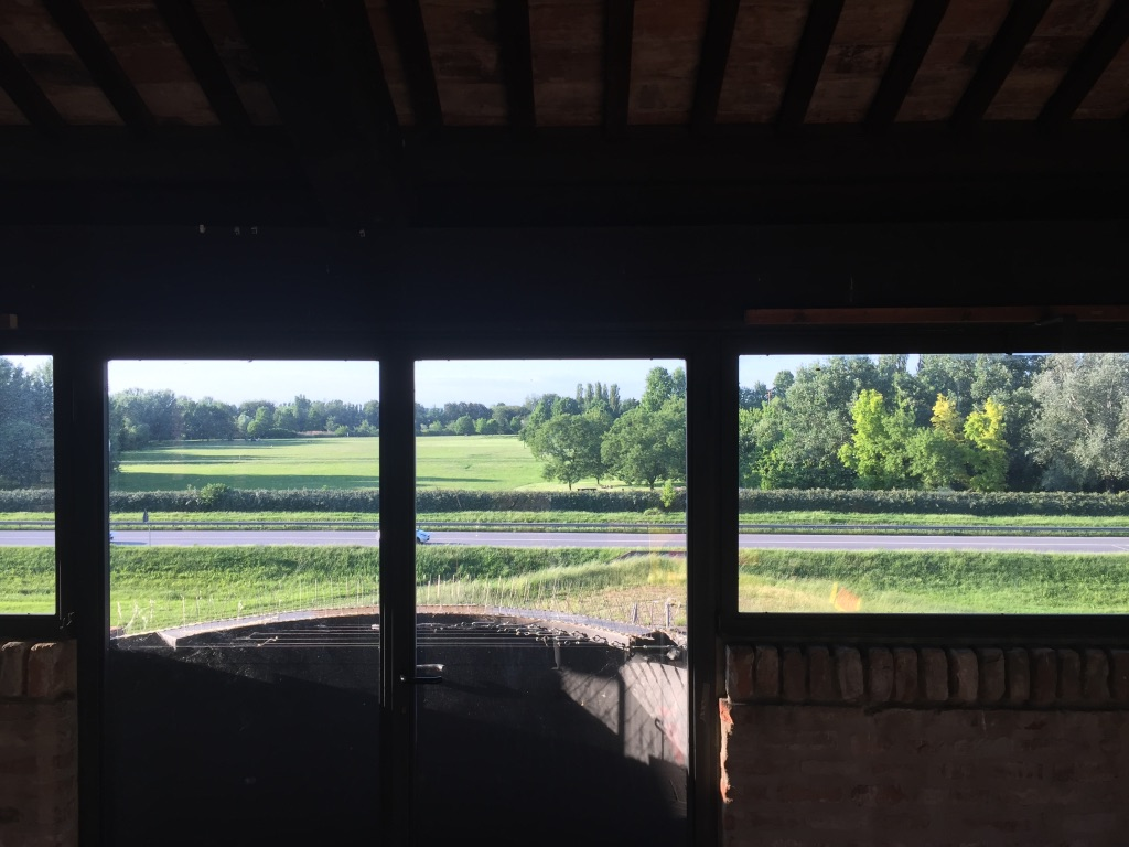 Veduta dalla torre della porta degli Angeli verso il parco urbano G. Bassani, Ferrara